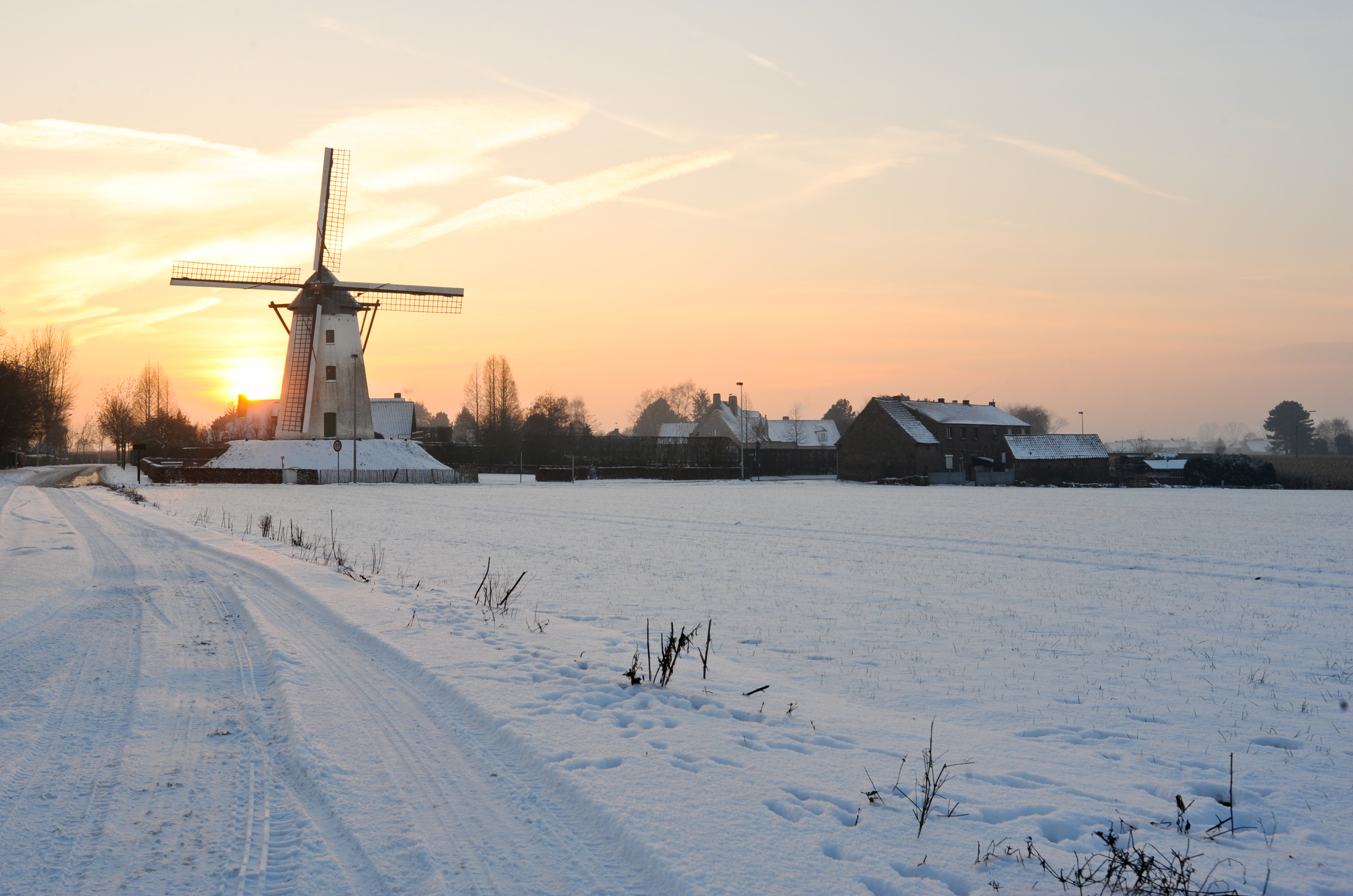 Schelderodemolen